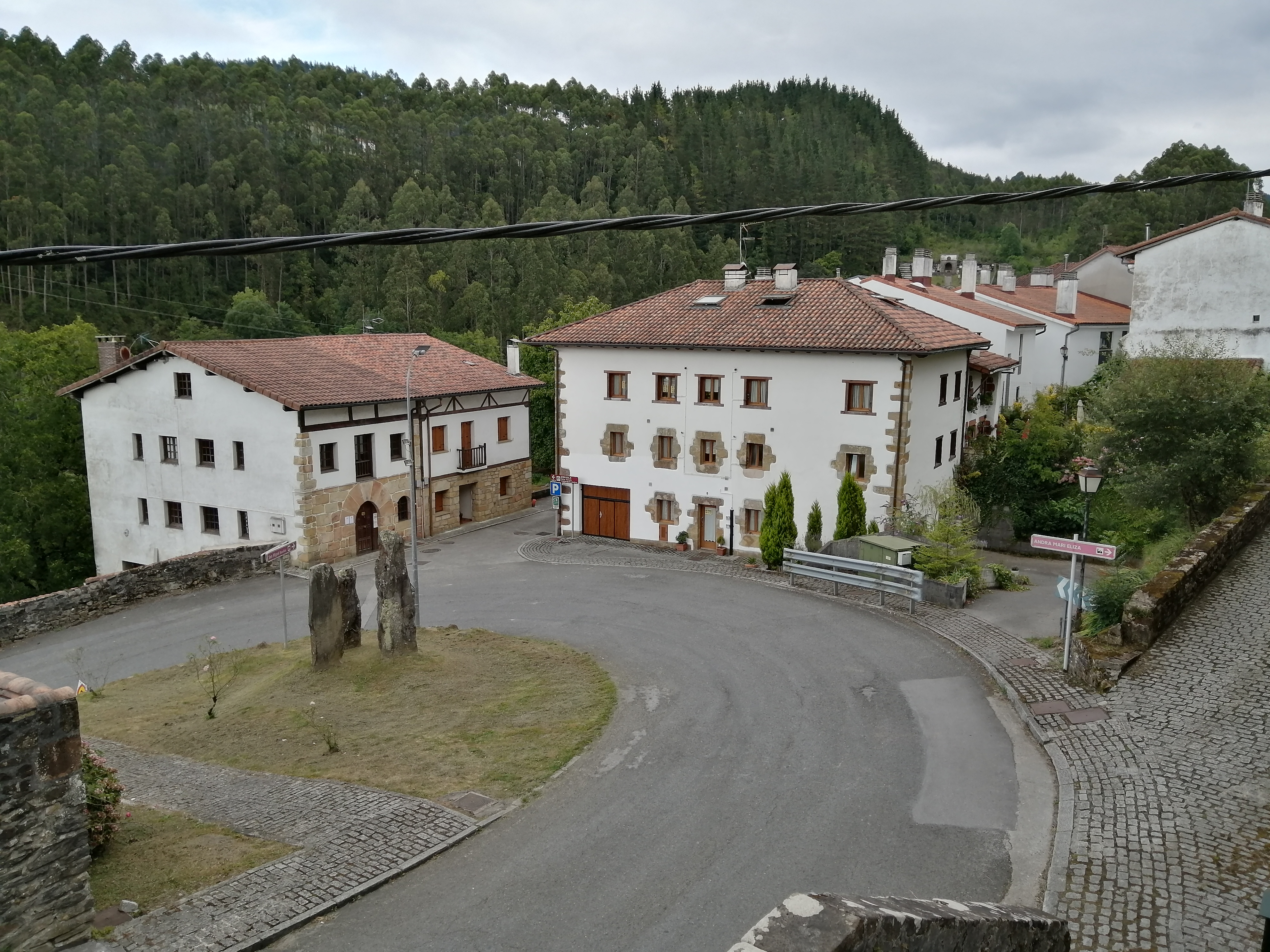 Gerrikaitz auzoa, Munitibar